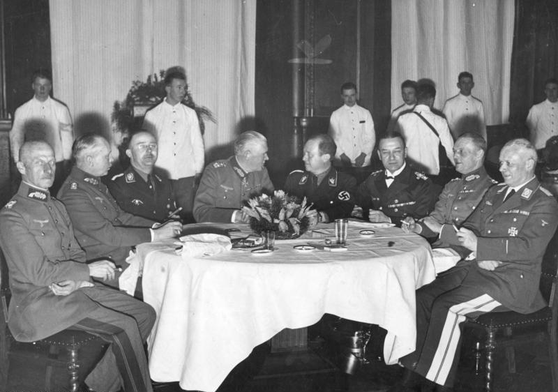 ADN-ZB/Archiv Zusammentreffen hoher Reichswehr- und SS-Führer am 13.1.1935 mit Reichswehrminister Werner v. Blomberg. v.l.n.r. General Ritter Wilhelm v. Leeb, General d. A., Freiherr Werner v. Fritsch, Reichsführer der SS Heinrich Himmler, Generaloberst Werner v. Blomberg, SS-Gruppenführer Körner, Admiral Erich Raeder, General d. I. Gerd v. Rundstedt und Präsident Wachenfeld. 1459-35